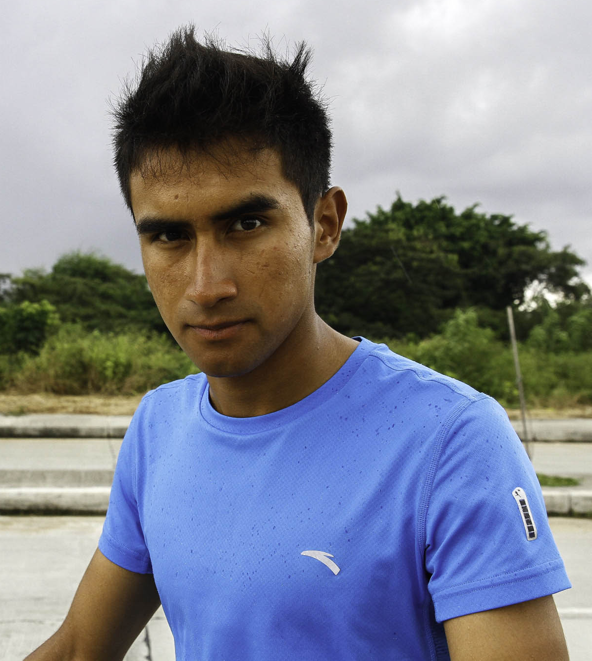 Jonathan Narváez por Agencia de Noticias ANDES